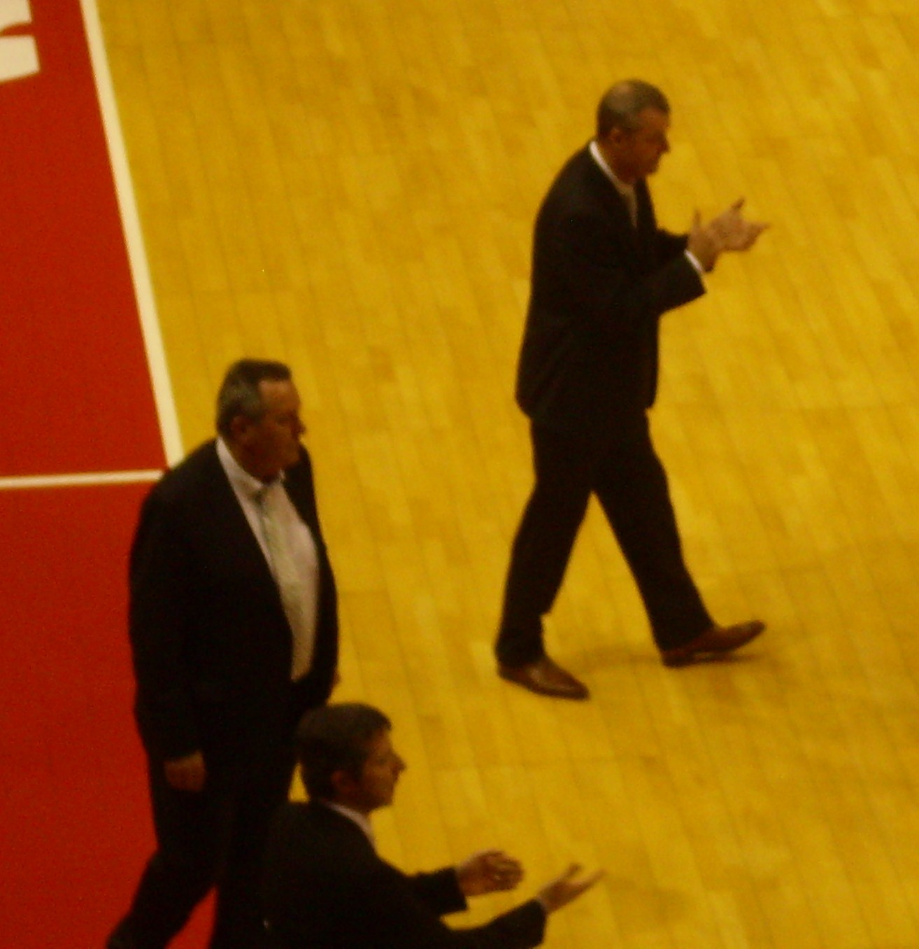 Gregor Beugnot (entraineur) et Yves Duvernois (directeur sportif) de l'Elan Chalon en 2011 lors du match de Pro A entre Chalon et Le Mans